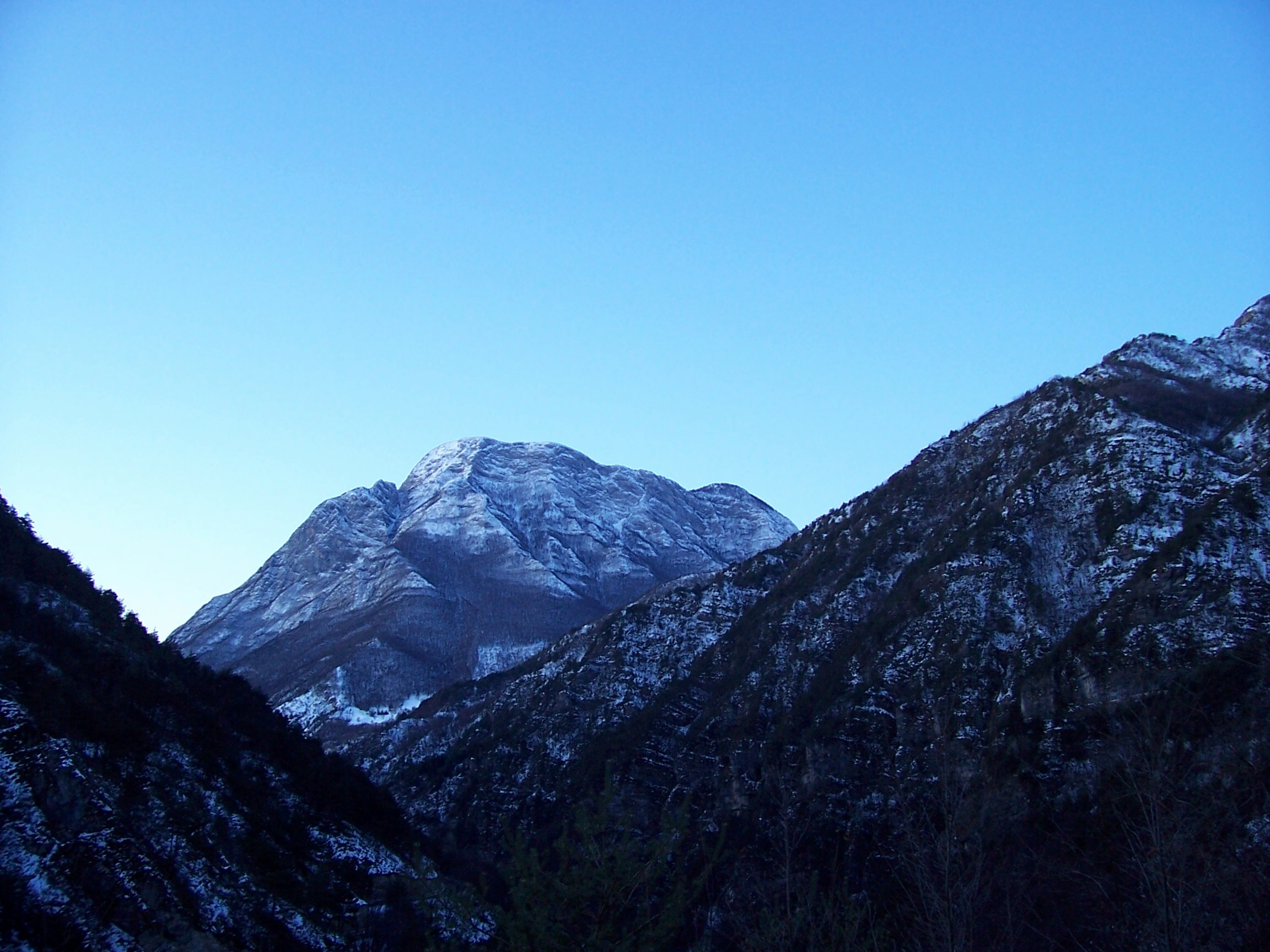 Monte Pizzocolo a Toscolano Maderno Brescia